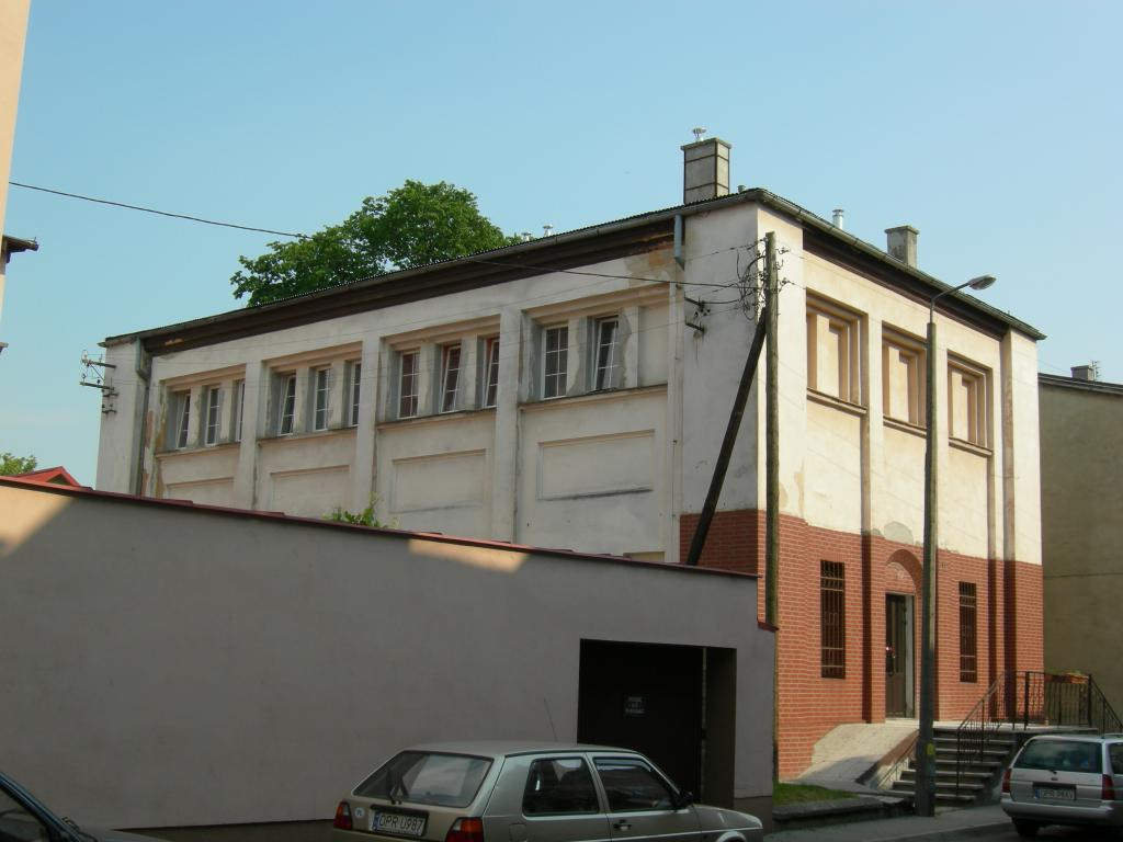 Synagoga w Głogówku/Synagogue de Głogówek